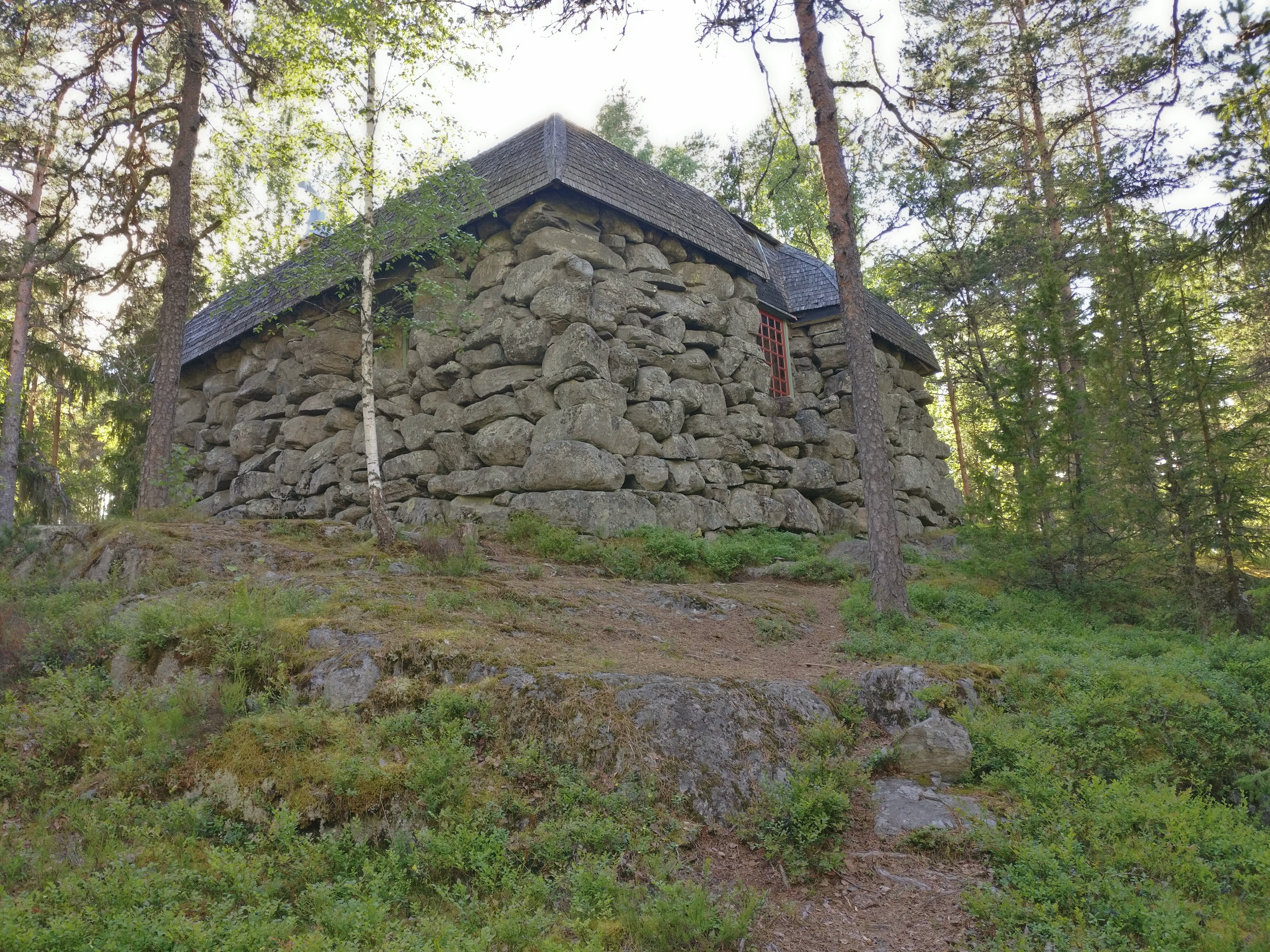 Sastamalan Pirunvuoren kivilinna